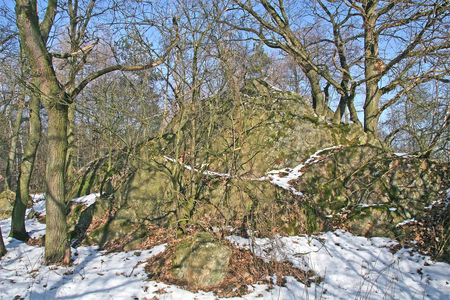 Čertova skála u Spytovic autor Zp